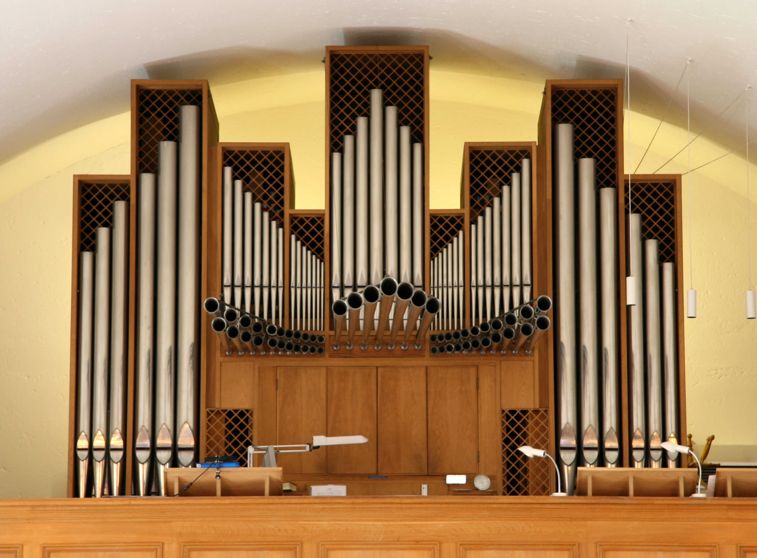 Flintholm Kirke in Copenhagen, Denmark. Organ.